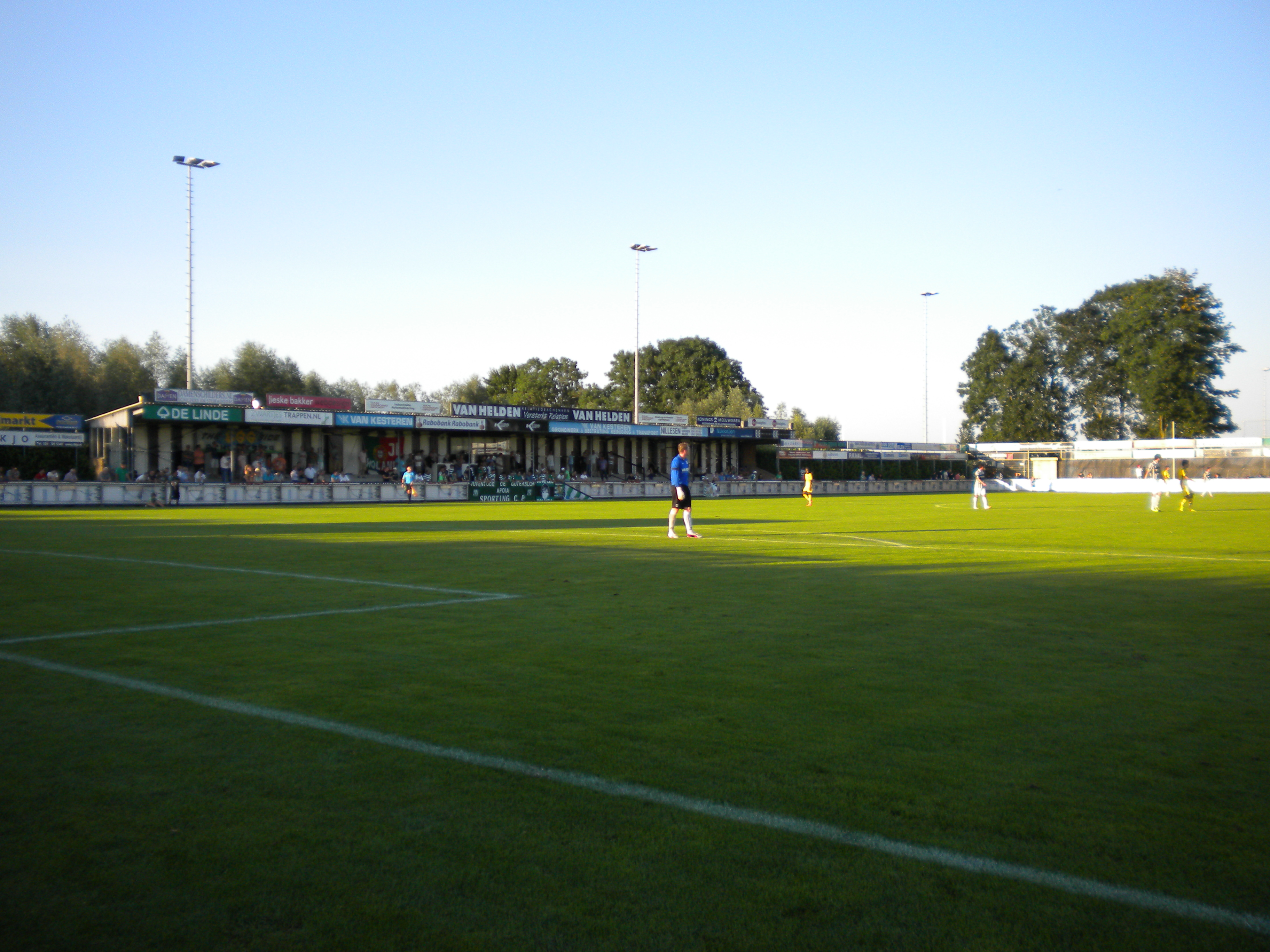 De noordtribune of Egg Side van Sportpark De Heikant